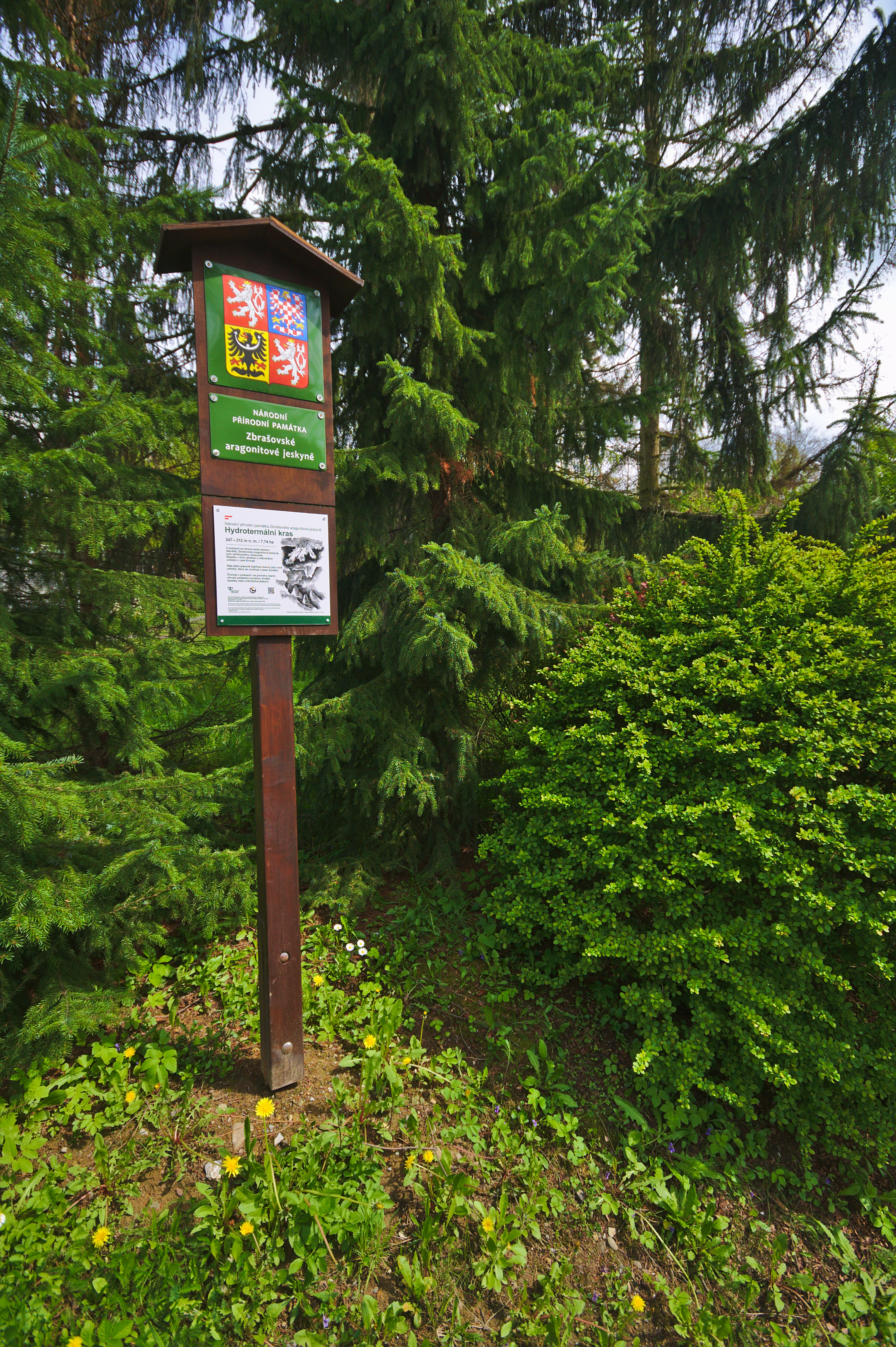 Národní přírodní památka Zbrašovské aragonitové jeskyně, okres Přerov